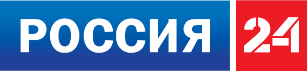 Логотип РИК "Россия-24"